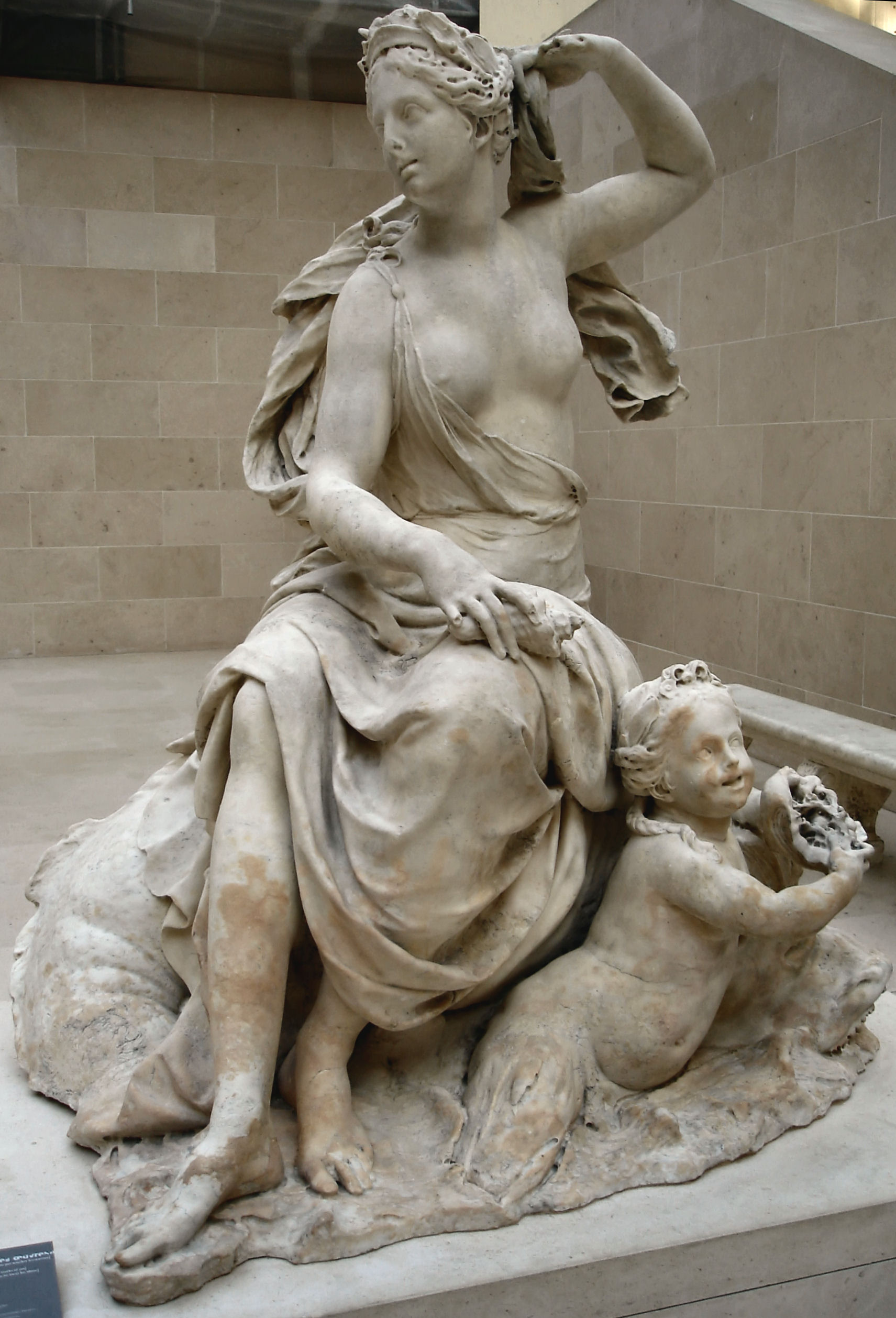 Amphitrite, Antoine Coysevox (Lyon, 1640 - Paris, 1720) Marbre H. : 1,81 m. ; L. : 1,52 m. ; Pr. : 1,11 m. Amphitrite, déesse de la mer, un des quatre groupes commandés pour la "rivière" du parc de Marly, faisait pendant au bas de la cascade à la statue de Neptune. Le modèle en plâtre est mis en place en 1699, et le marbre exécuté en 1705. Saisi au parc de Marly en 1796, le groupe ira décorer une fontaine à Brest en 1801. Dépôt des Monuments historiques, 1966 R.F. 3005